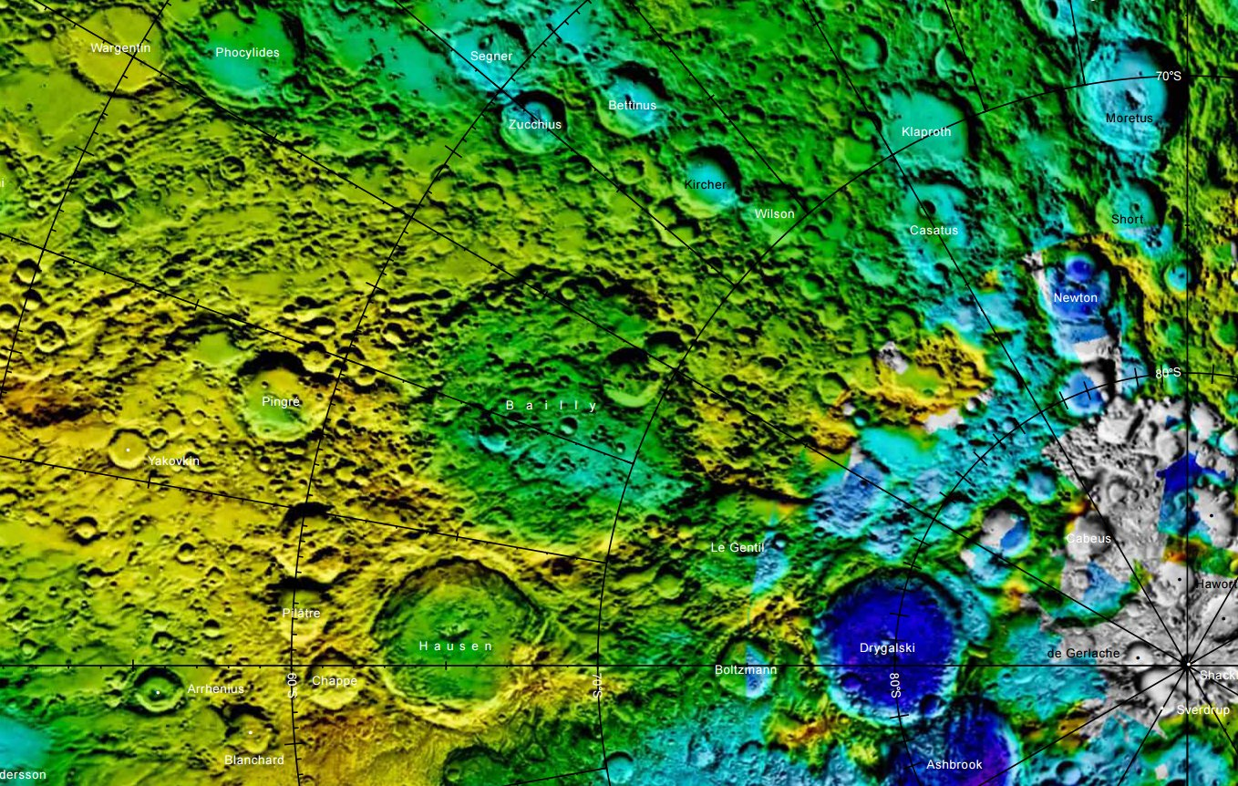 Cráter lunar Pingré. Localización. (Imagen LRO)